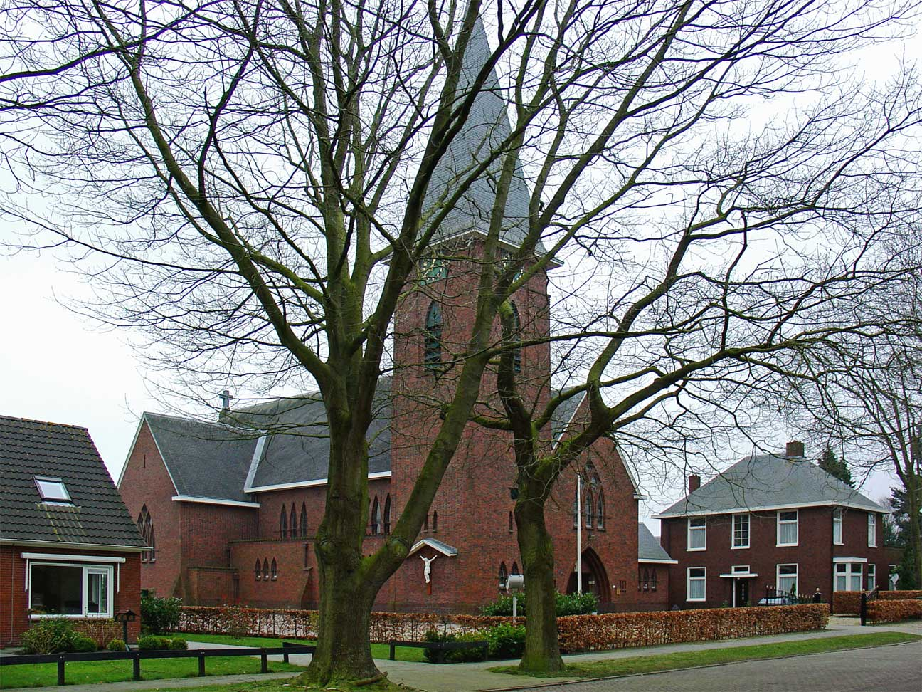 R.K. Sint Josephkerk te Zandberg